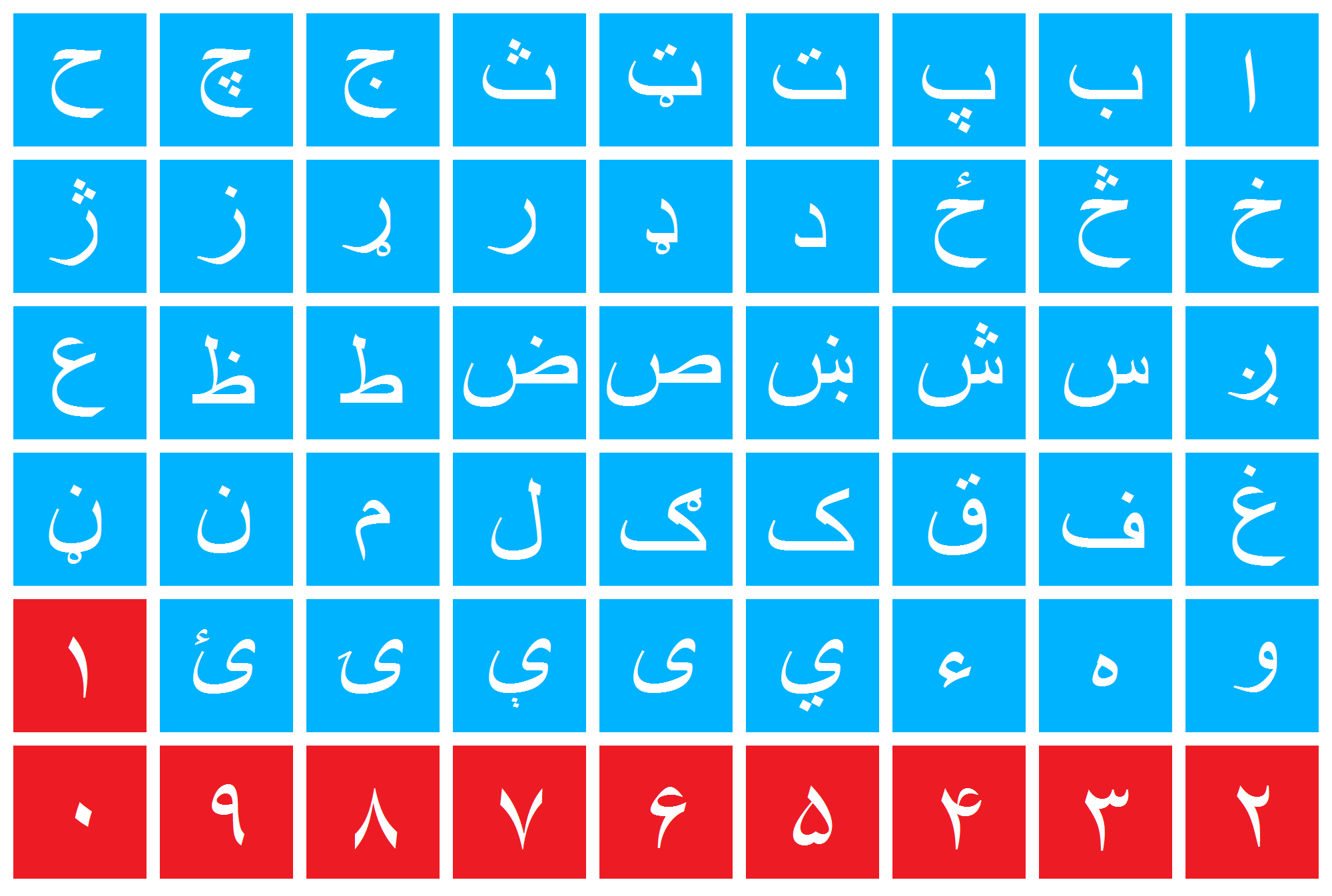 پښتو: پښتو الفبې